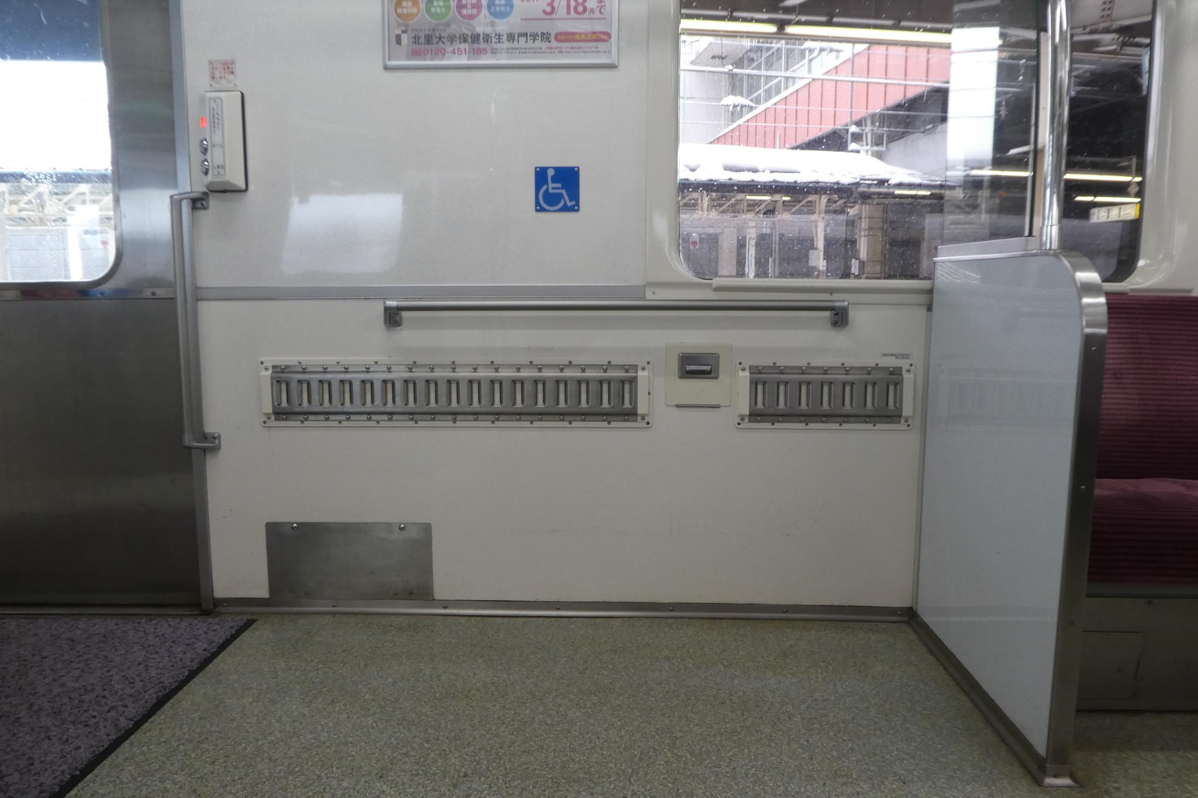 北越急行HK100形電車の貨物スペース。